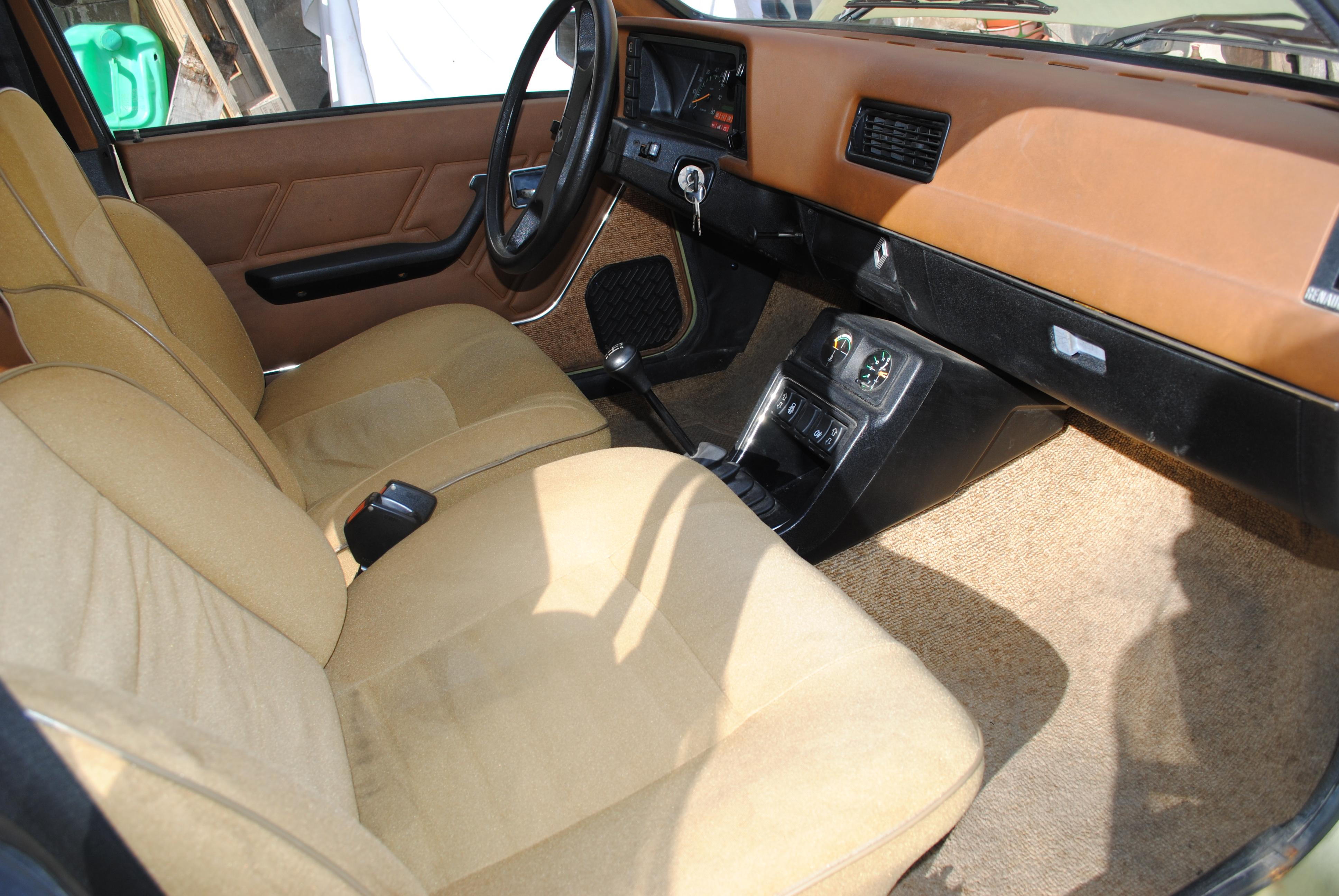 Renault 14 TS Phase 2